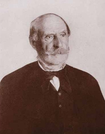 Stoczek József magyar mérnök, egyetemi tanár, a Magyar Tudományos Akadémia tagja, alelnöke.